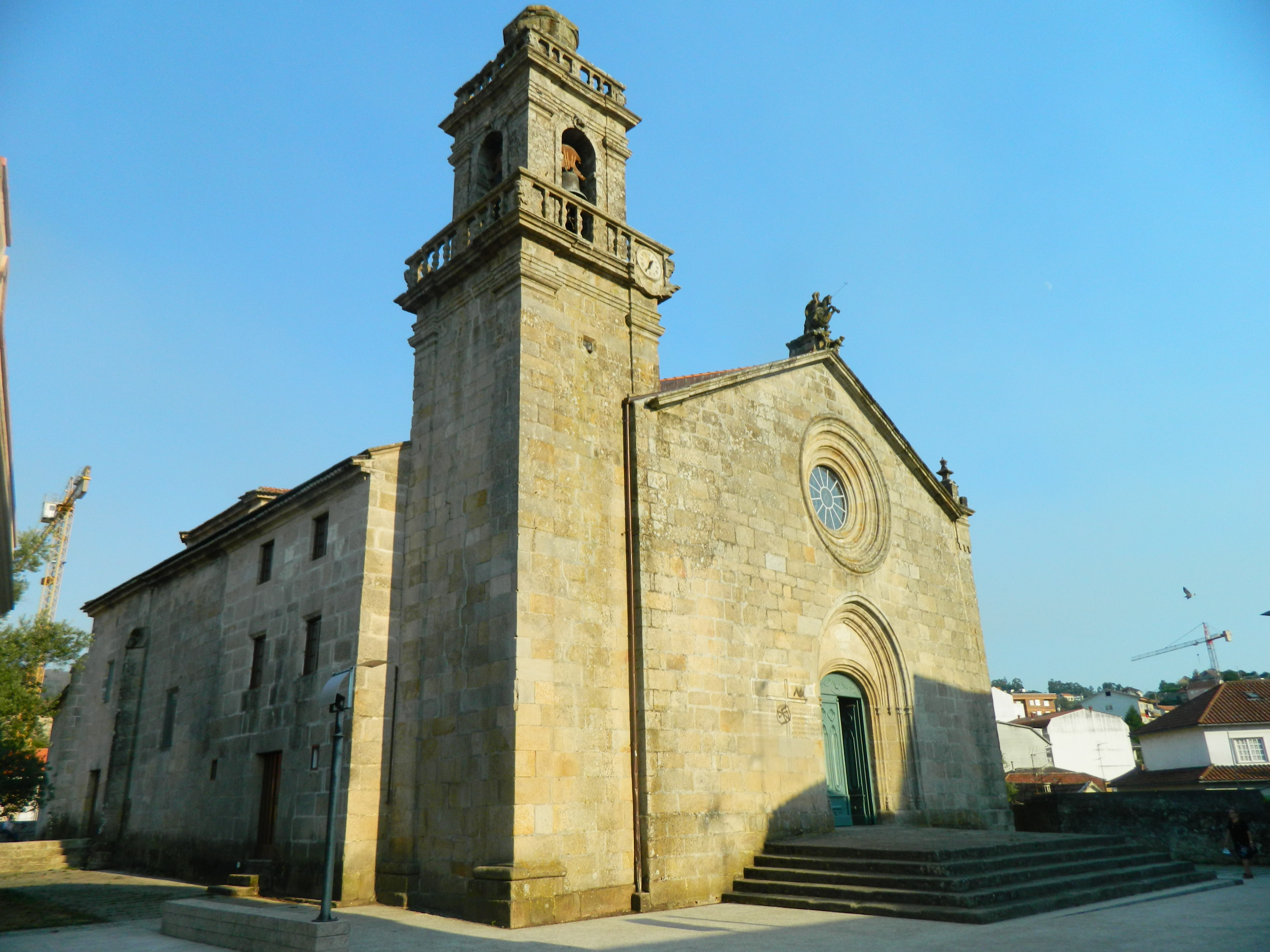 Igrexa Parroquial Santiago Redondela